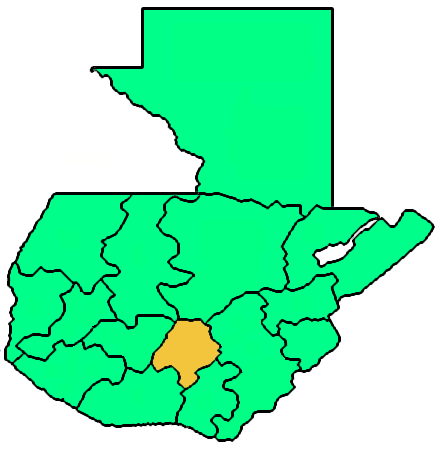 Mappa dell'arcidiocesi cattolica di Santiago, in Guatemala. Lavoro personale eseguito a partire da questa immagine di Commons. Fonte per i confini delle diocesi